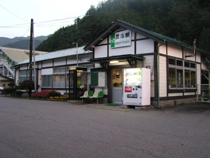 Moichi Station, Miyako, Iwate, Japan